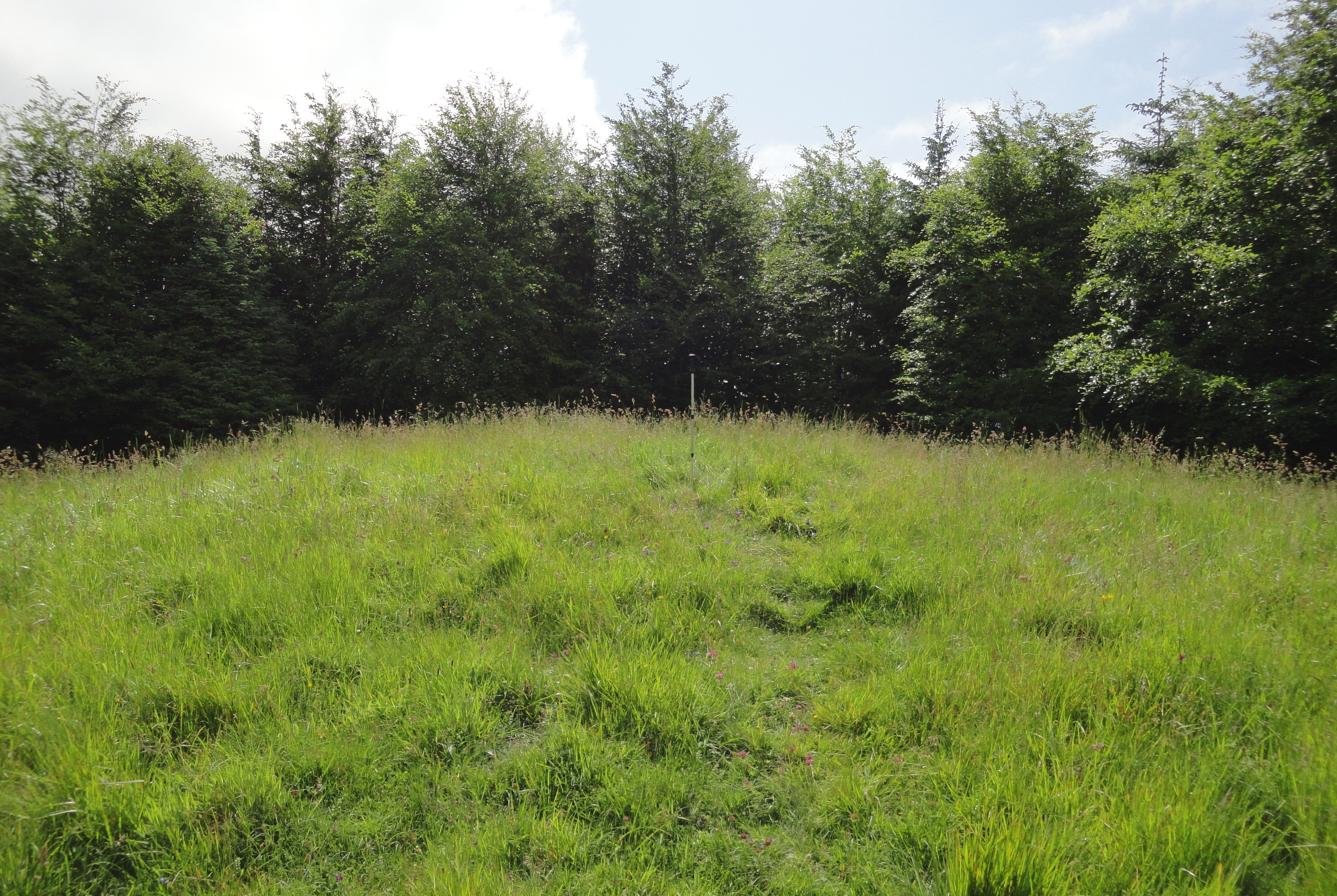 Arreta tumulua - Aia